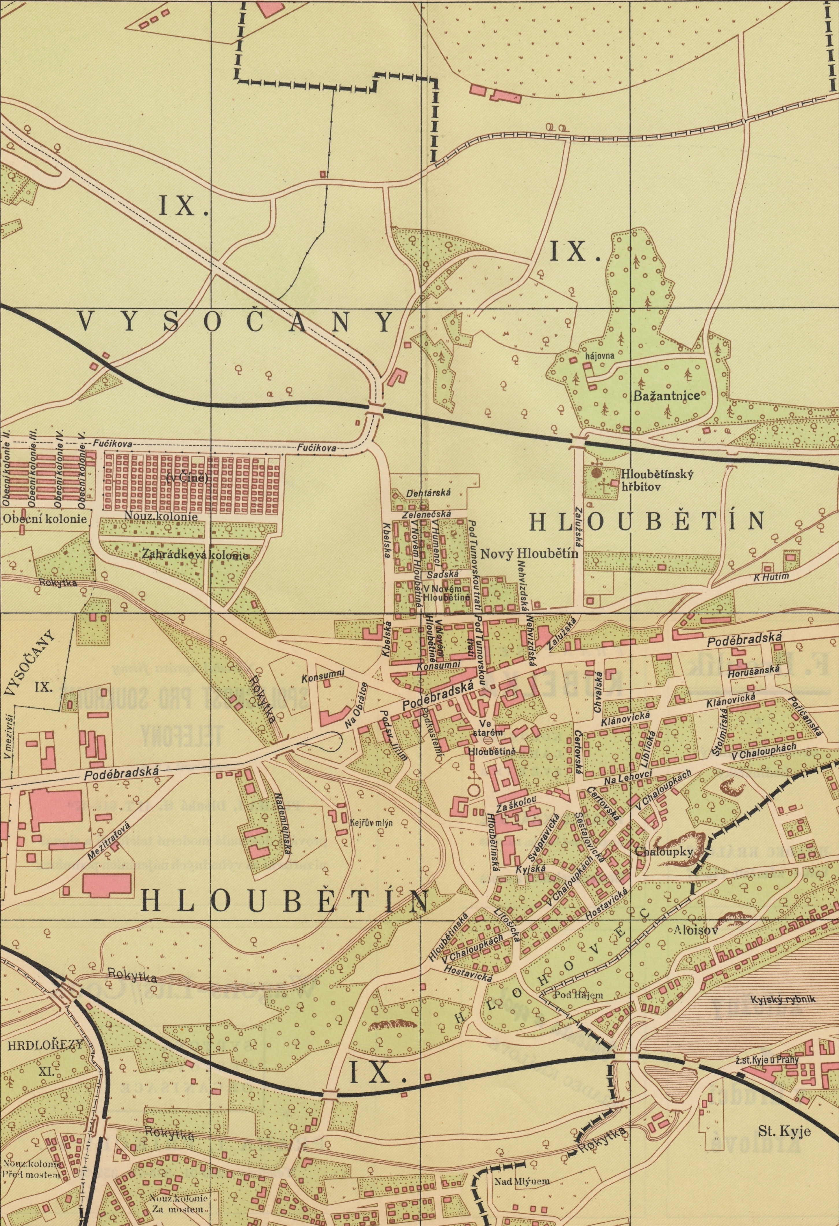 Hloubětín, plán zobrazuje stav z druhé poloviny 40. let 20. století. Zpracováno na základě dat z Orientační knihy Velké Prahy, mapové listy 14 a 23.